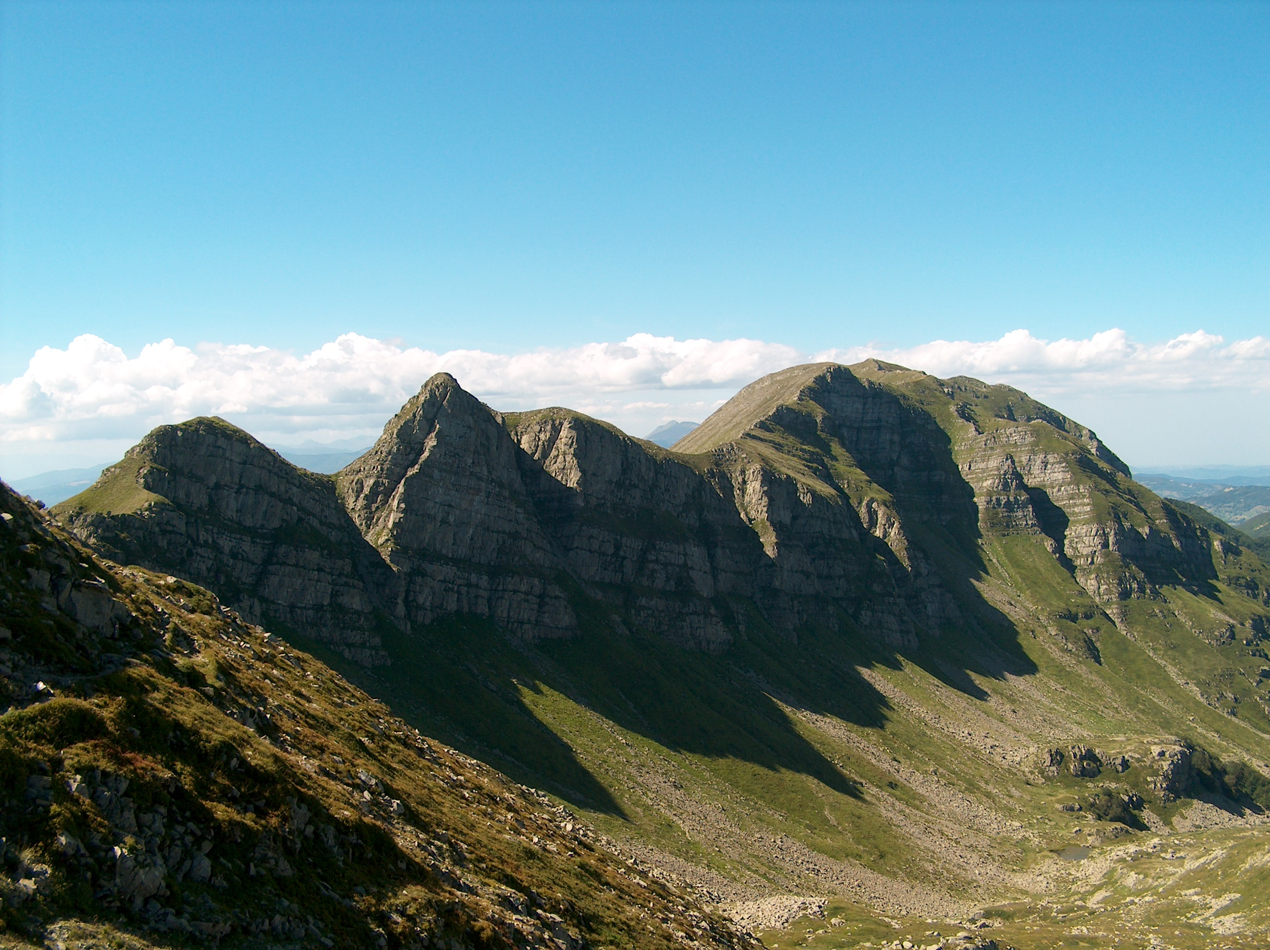 Crinale del Monto Giovo (al confine fra le provincie di Lucca e Modena) visto dalla vetta del monte Rondinaio, poco distante